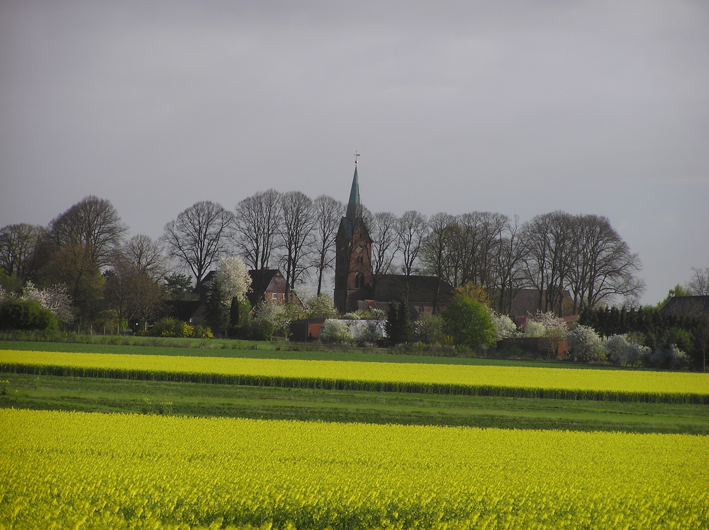 Hohenhorn